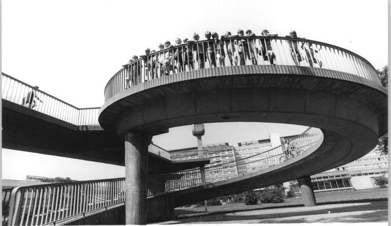 Cottbus, Fußgängerbrücke ADN-ZB Weißflog 18.9.1984 Cottbus: 35. Jahrestag der DDR-Jüngste Großstadt der Republik-Zu den vielden neuen Bauten der Stadt, Cottbus wurde im 2. Weltkrieg zu zwei Dritteln zerstört, gehören auch zahlreiche Verkehrsbauten, Wie diese Fußgängerbrücke im Zentrum. Sie verbindet die alte Stadtmauer mit der Stadtpromenade. siehe auch 1984-0918-1-3 und 5N